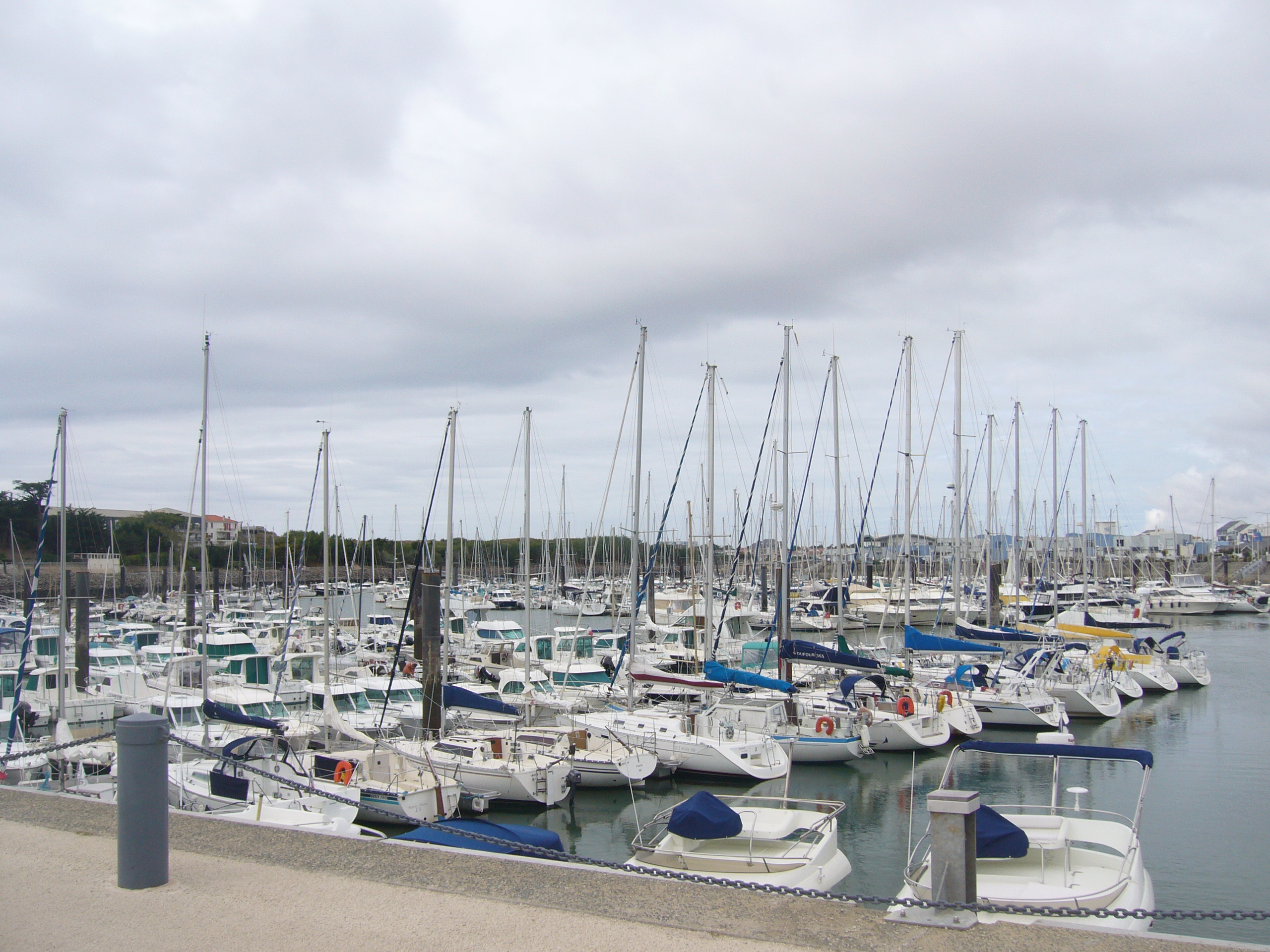 Saint-Gilles-Croix-de-Vie dans le département de la Vendée (France) : le port de plaisance « Port La Vie » côté Saint-Gilles en septembre 2007.